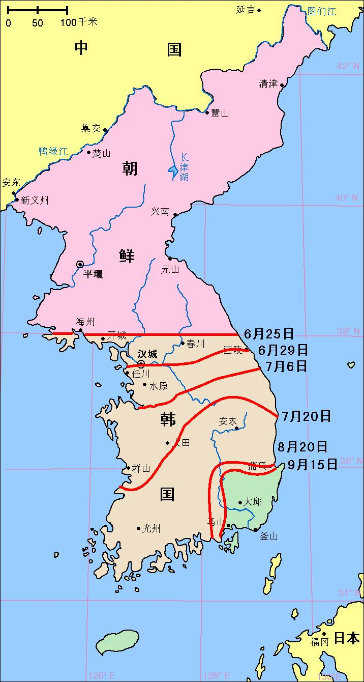 朝鲜战争第一阶段朝鲜人民军进攻形势地图